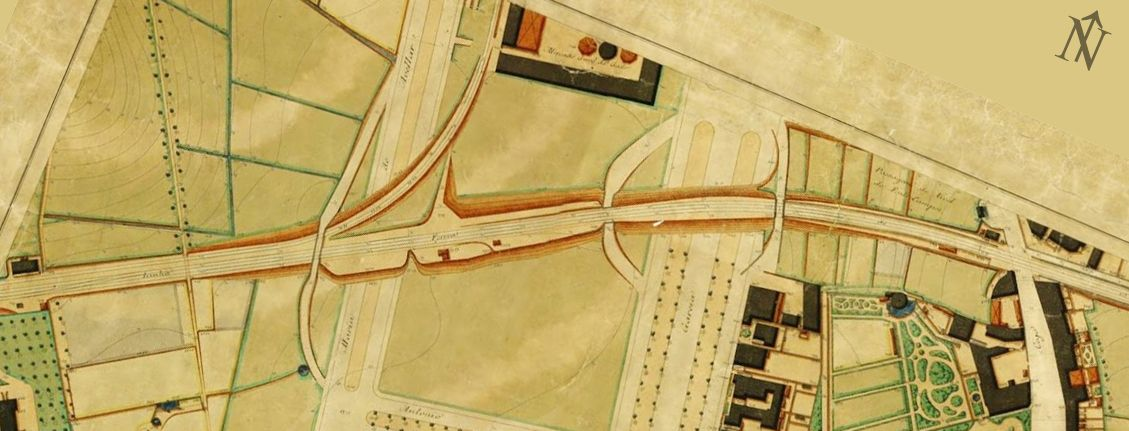 Mapa do cruzamento da Linha de Cintura com a Avenida da República, em Lisboa (frag. folha 10-M, des. Abel Santos, 1908); desorientado a 23°.